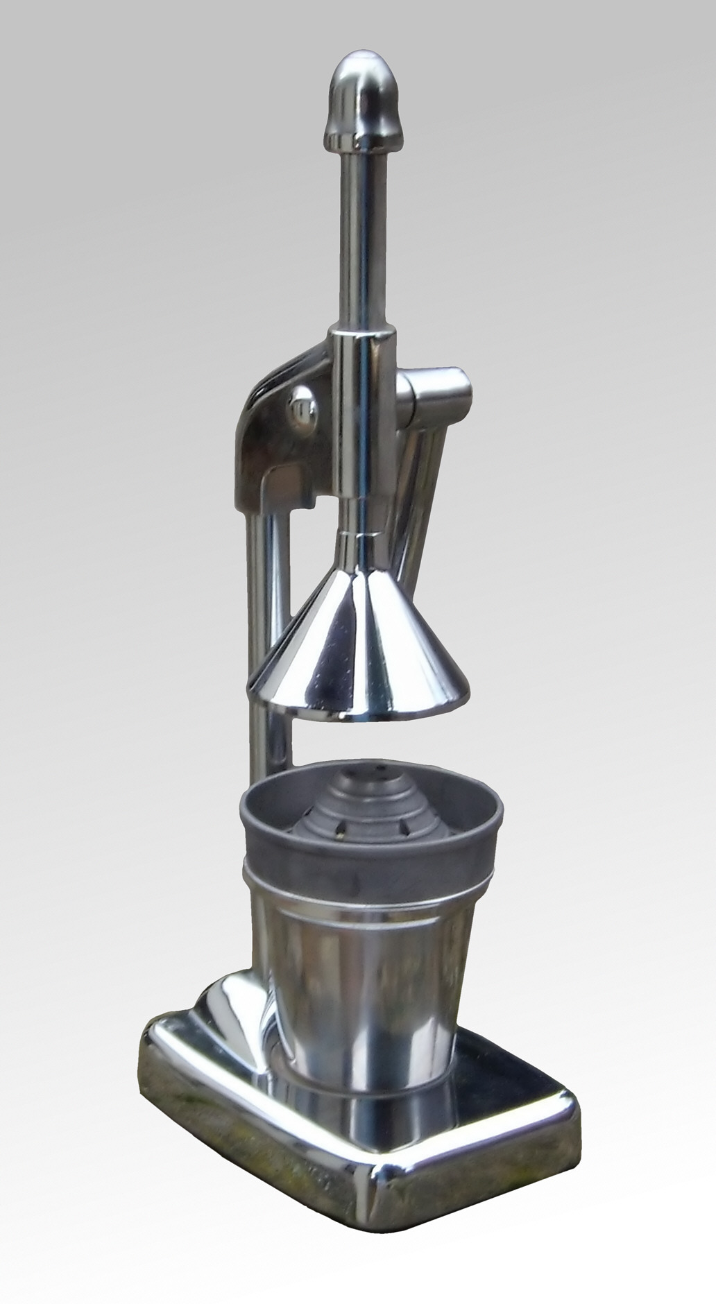 Zitronenpresse mit Einhebelsystem und Auffangbecher.